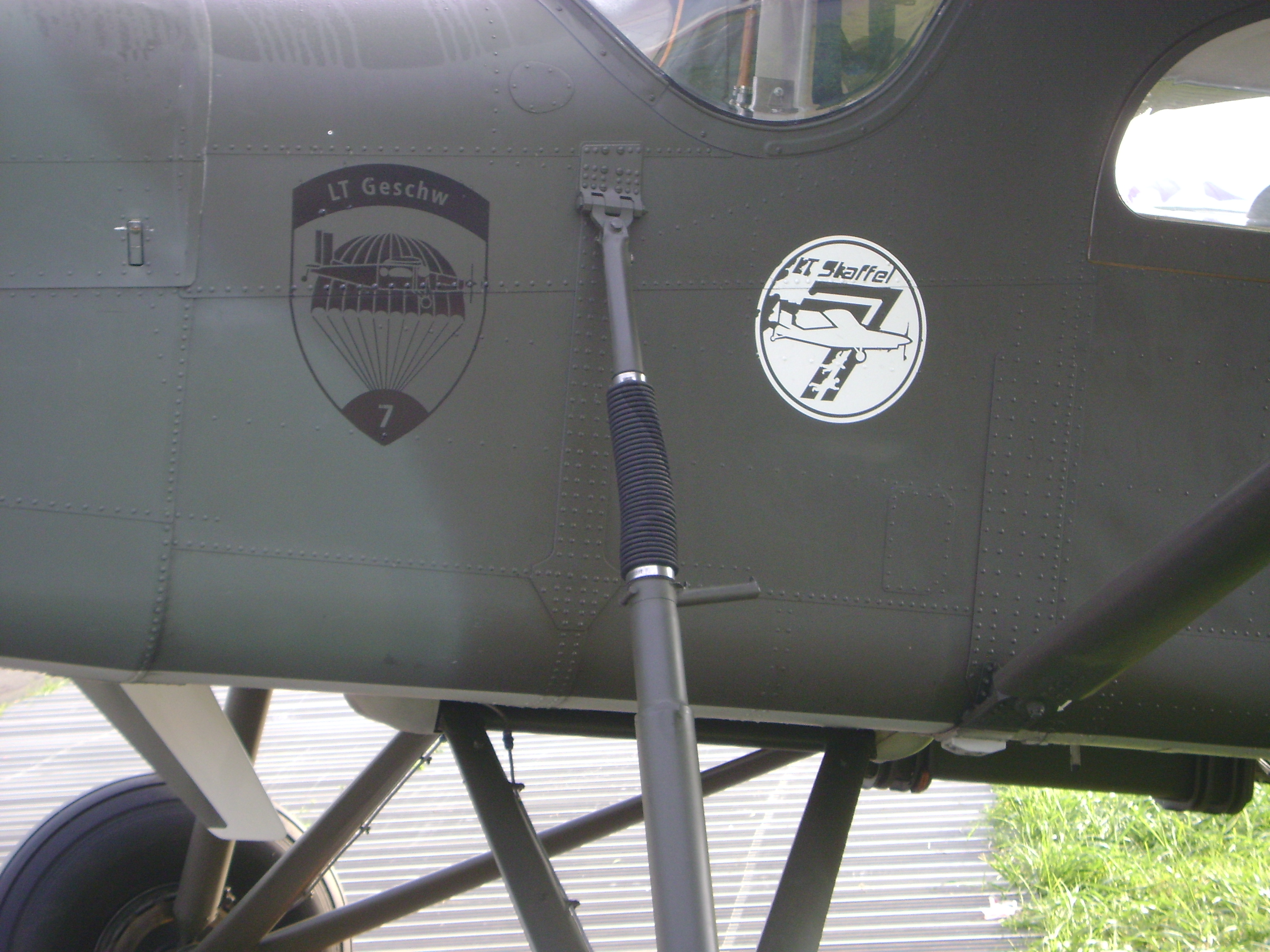 PC-6Abzeichen